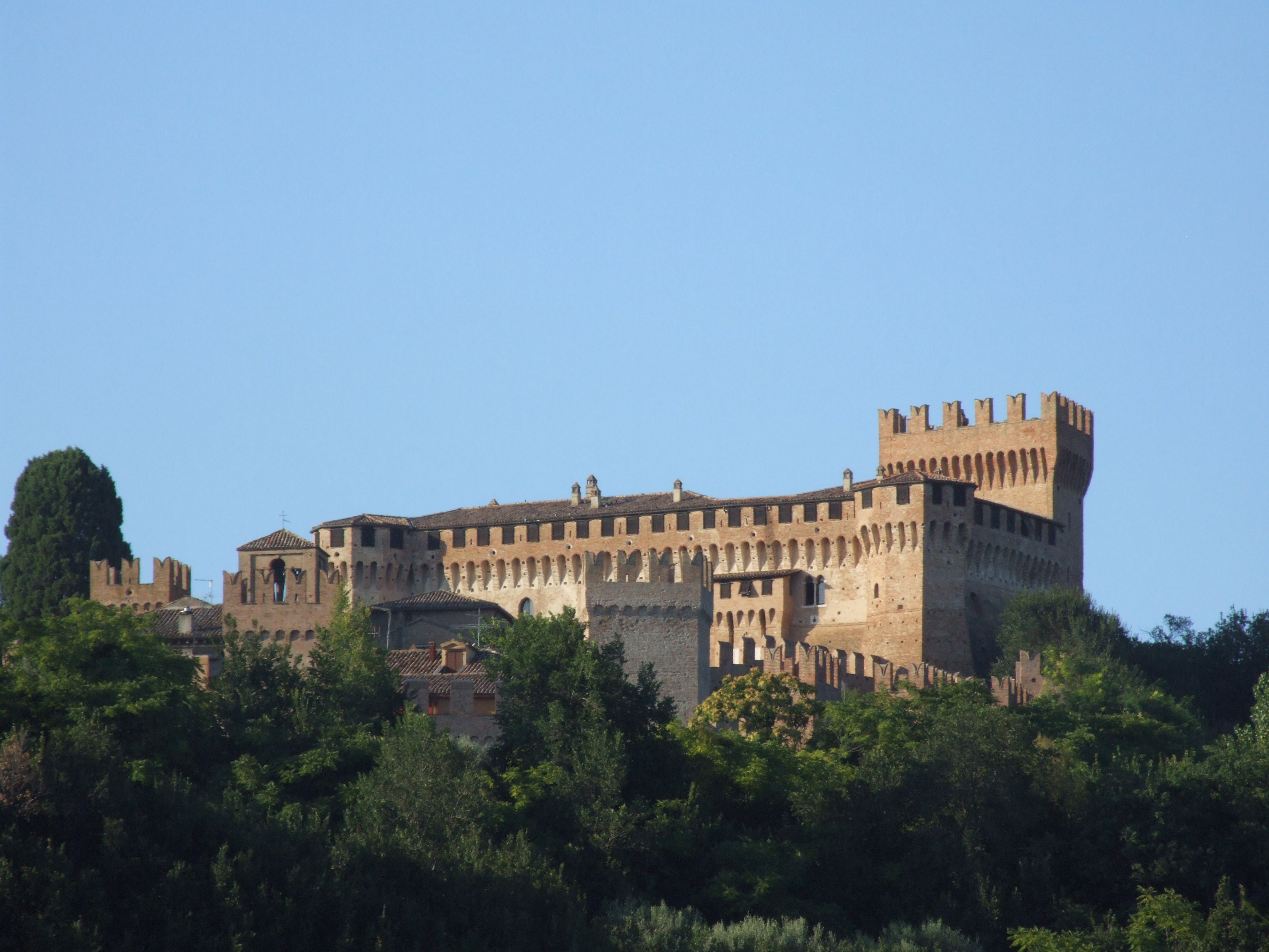 Rocca Demaniale - MIBAC This is a photo of a monument which is part of cultural heritage of Italy.